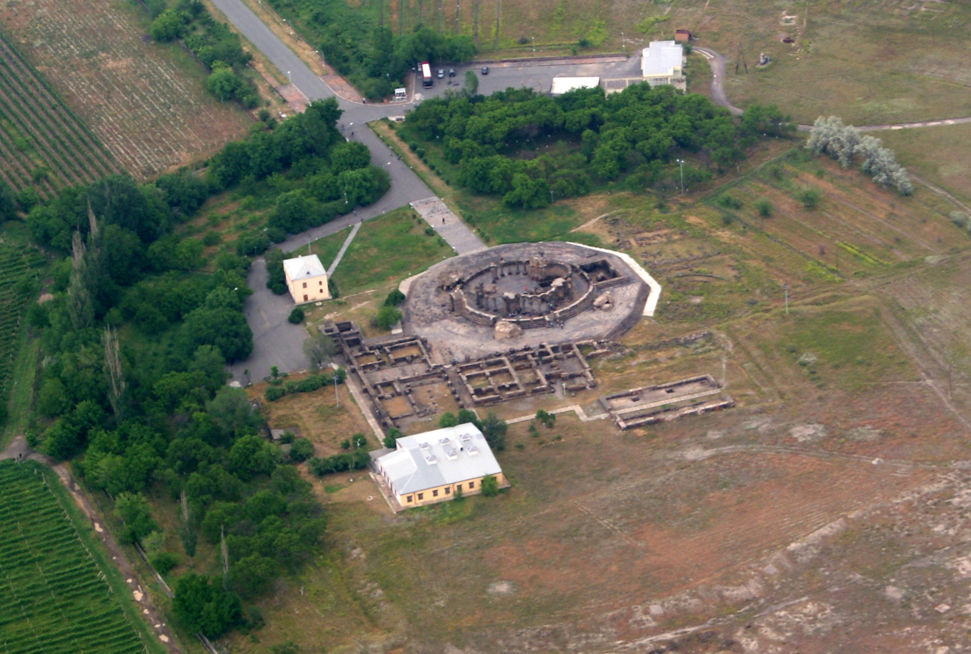 Եկեղեցական համալիր՝ Վաղարշապատի Սբ. Գրիգոր (Զվարթնոց) 2/13